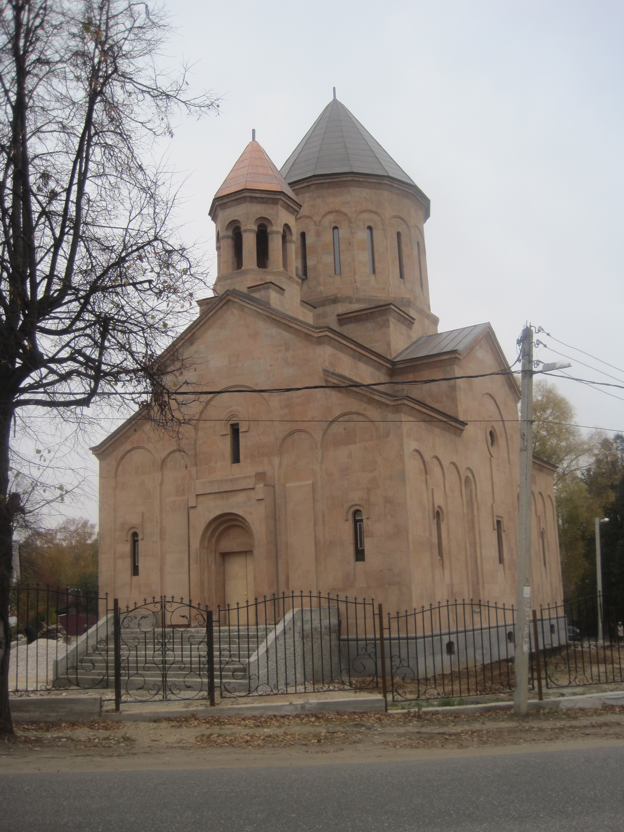 Eglise construite en 2014 pour la communauté arménienne de Vladimir